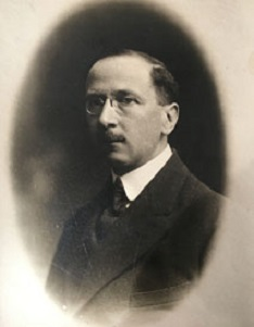 Pietro Toesca